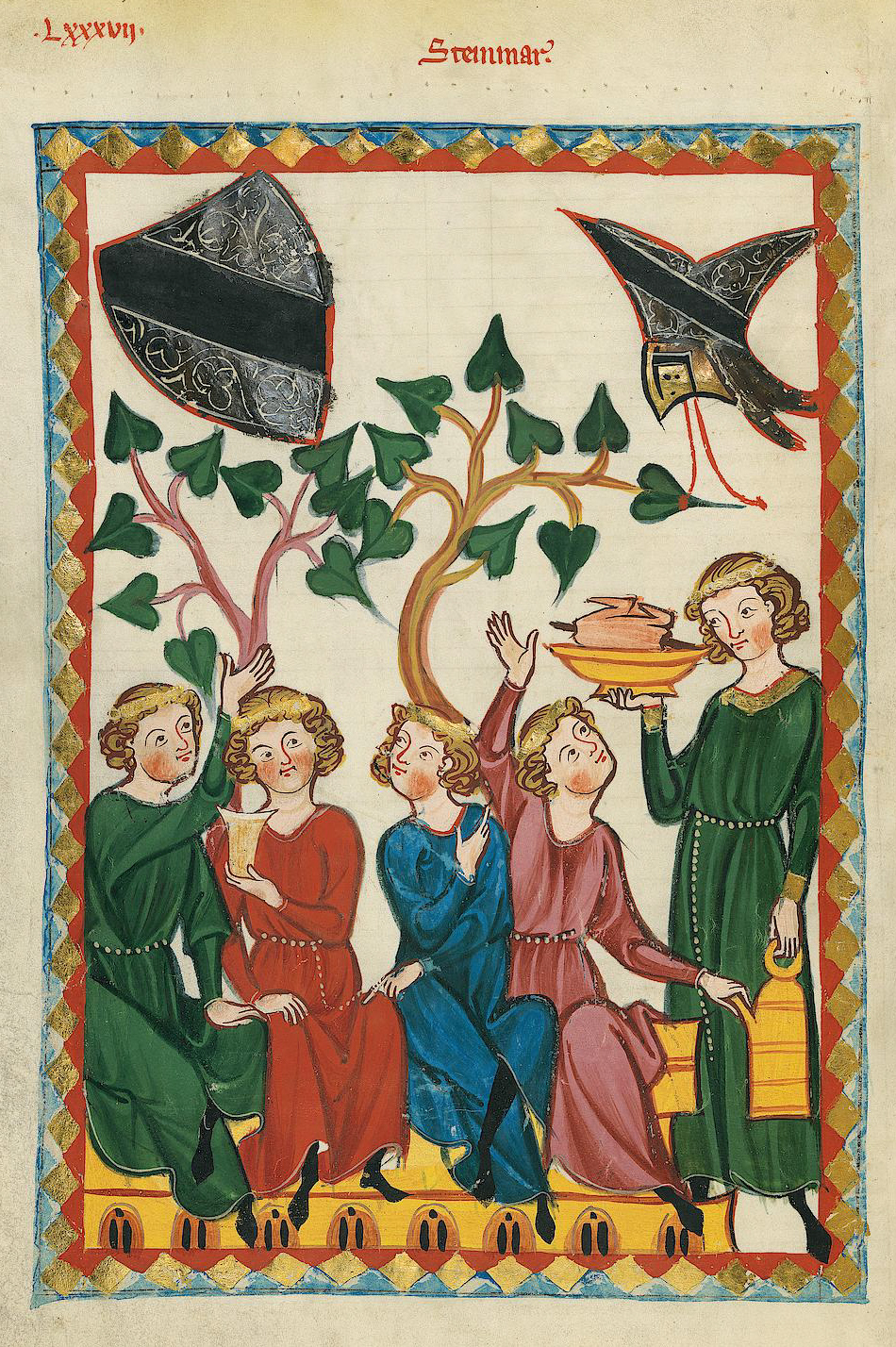 Codex Manesse, UB Heidelberg, Cod. Pal. germ. 848, fol. 308v: Steinmar